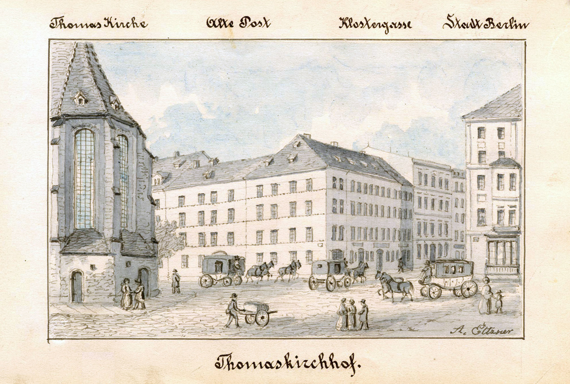 Thomaskirchhof, lavierte Federzeichnung von Adolf Eltzner; Postbetrieb auf dem Leipziger Thomaskirchhof vor der ehemaligen Post im Amtshaus.